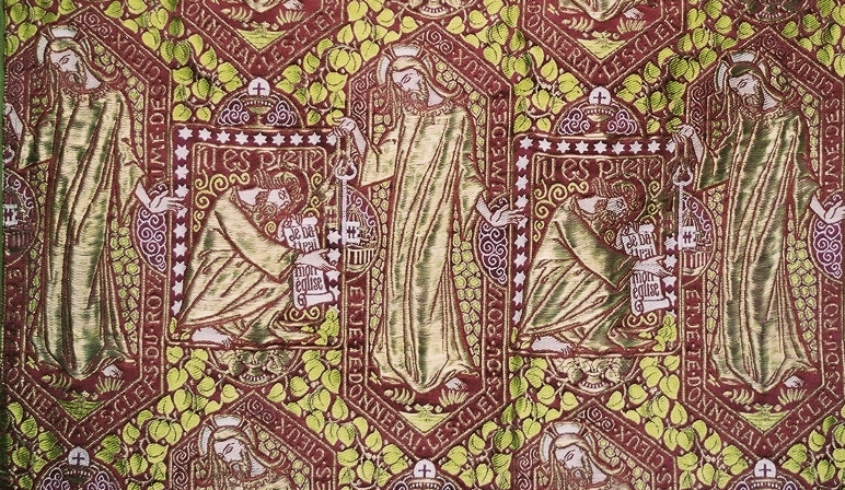 Franse goudbrokaat Tu es Pierre